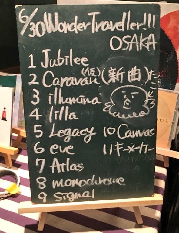 amiinAセトリボード(20180630(1))